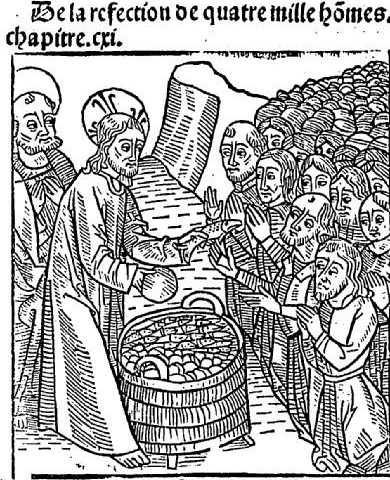 Illustration, Multiplication des pains Titre : Le grand "Vita Christi" en françoys, par Ludolphe le Chartreux, traduit par Guillaume Lemenand Auteur : Ludolphe de Saxe (1300?-1378) Éditeur : Matthias Huss etJacques Buyer (Lyon)